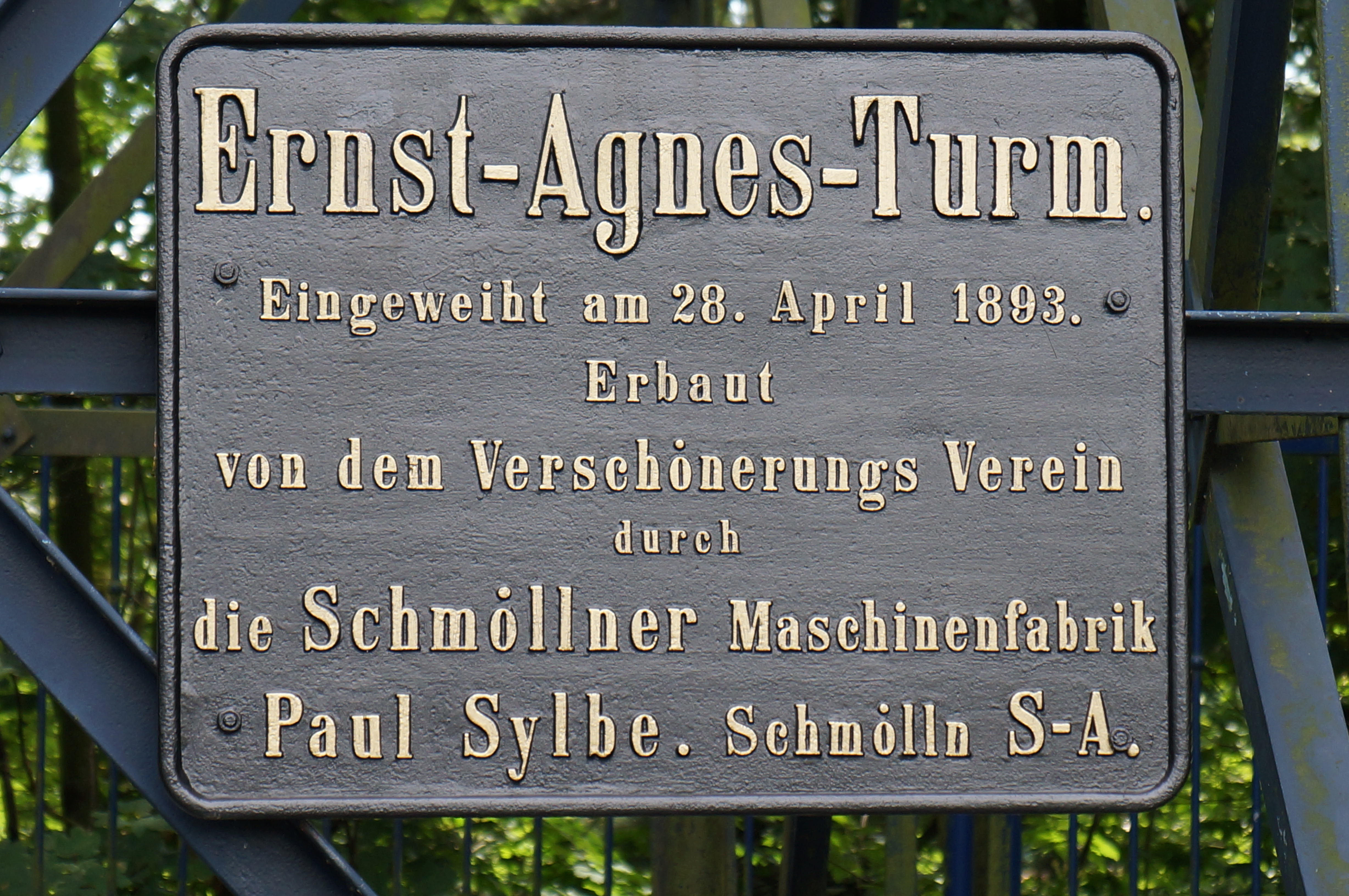 Tafel am Ernst-Agnes-Turm.